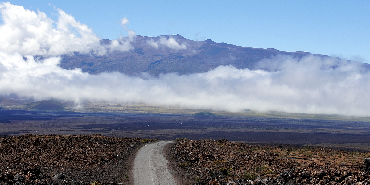 Иллюcтрация для викиуебника Гавайеведение